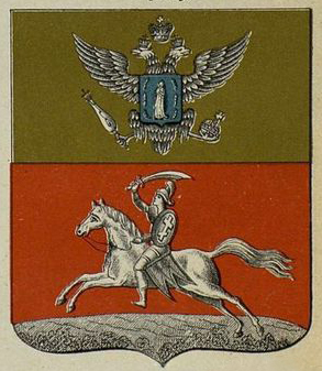 Беларуская (тарашкевіца): Герб Слуцкага павету (Słucak) з Пагоняй (Pahonia)